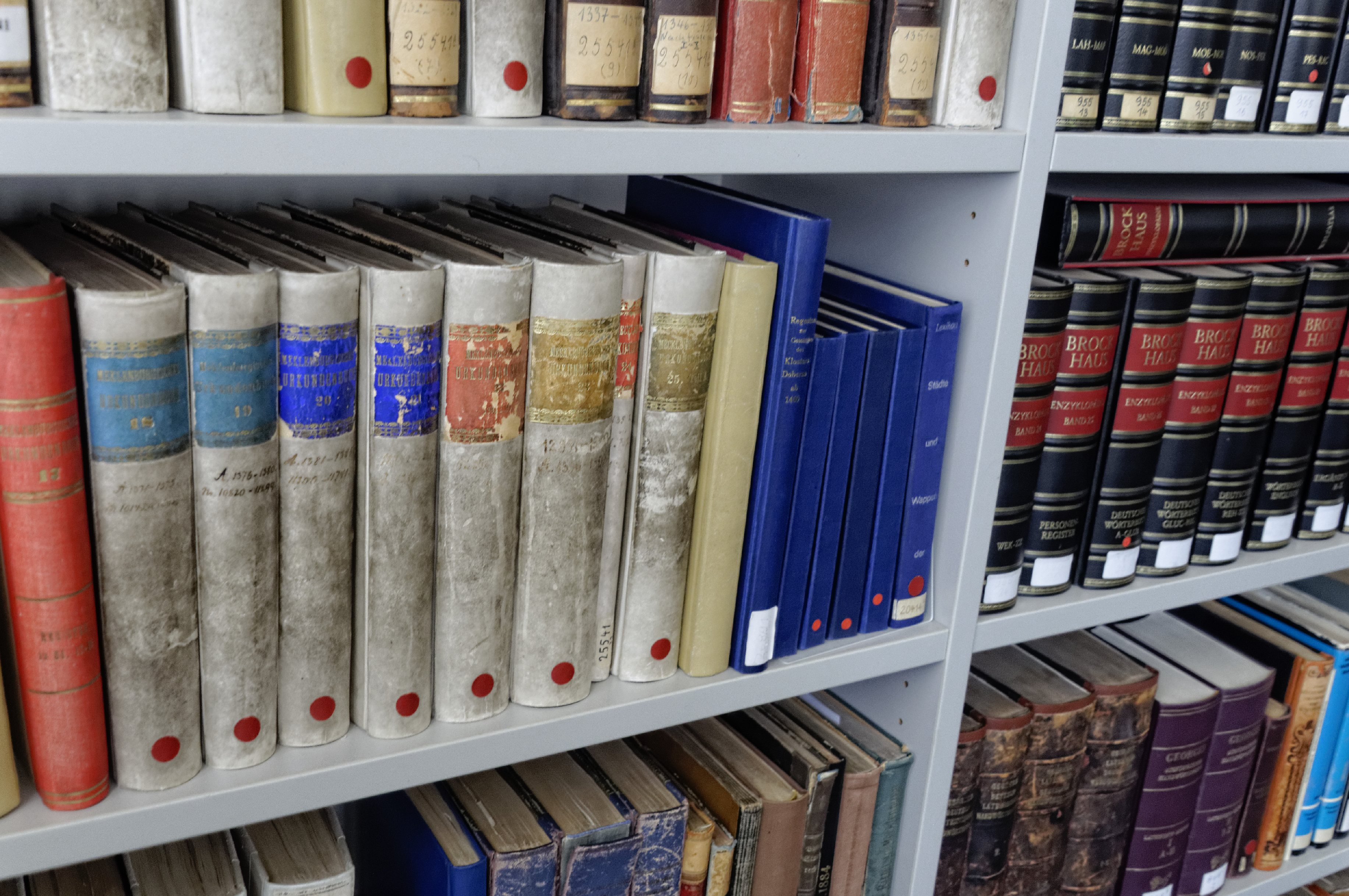 Bilder aus Schwerin 2017 Dieses Foto entstand durch die Unkostenübernahme der Wikimedia Deutschland e. V. Wikimedia Deutschland e. V. hilft den Freiwilligen der Wikipedia bei der Erstellung von freien Inhalten. Dieses Foto entstand durch die Technik von der Wikimedia Österreich e. V. Wikimedia Österreich e. V. hilft den Freiwilligen der Wikipedia bei der Erstellung von freien Inhalten.